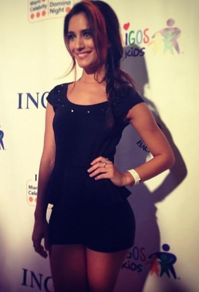 Sol Rodríguez